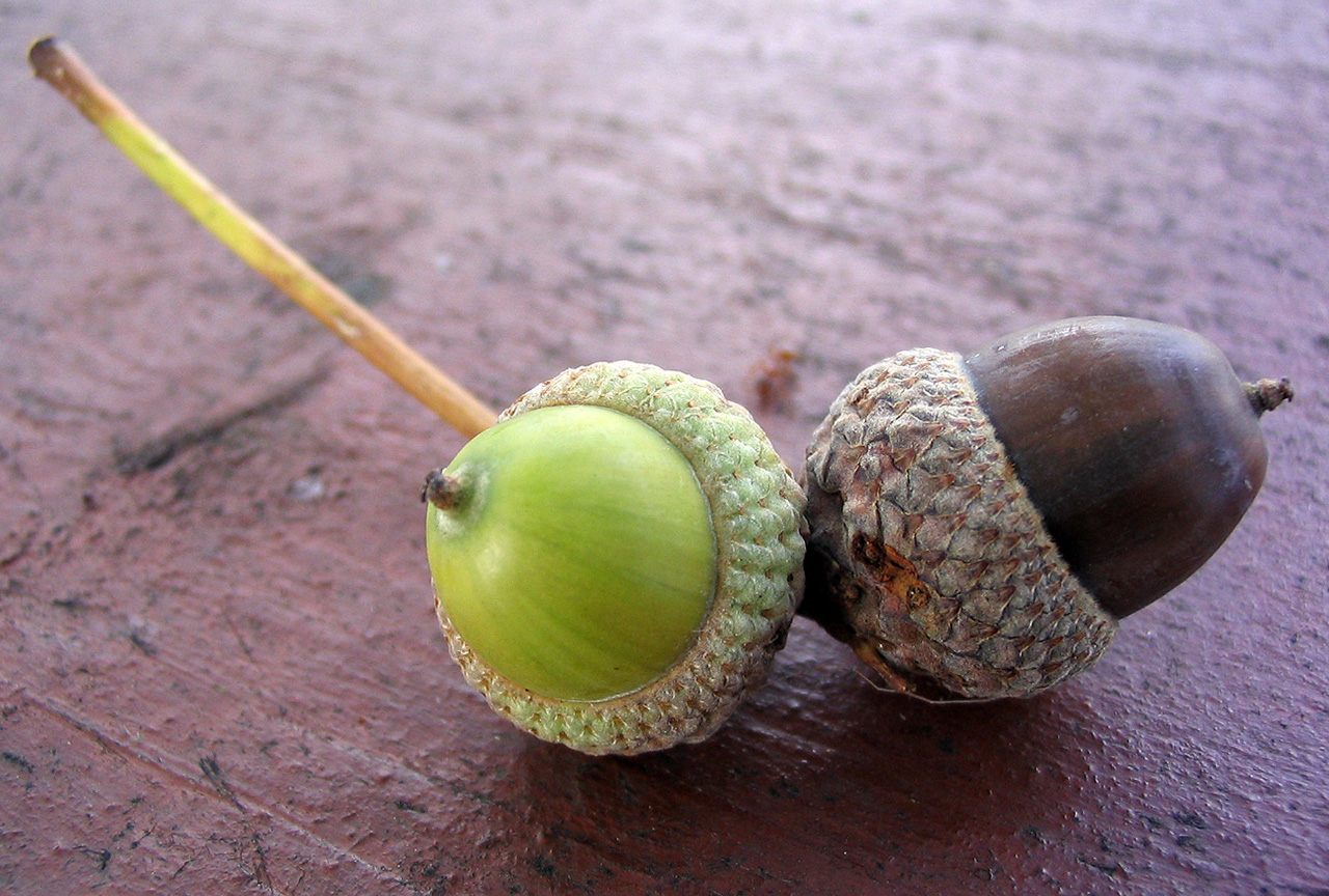 Beschreibung: Eicheln (im Hintergrund verschwommen eine Ameise) Author: Darkone Date: 26. September 2004